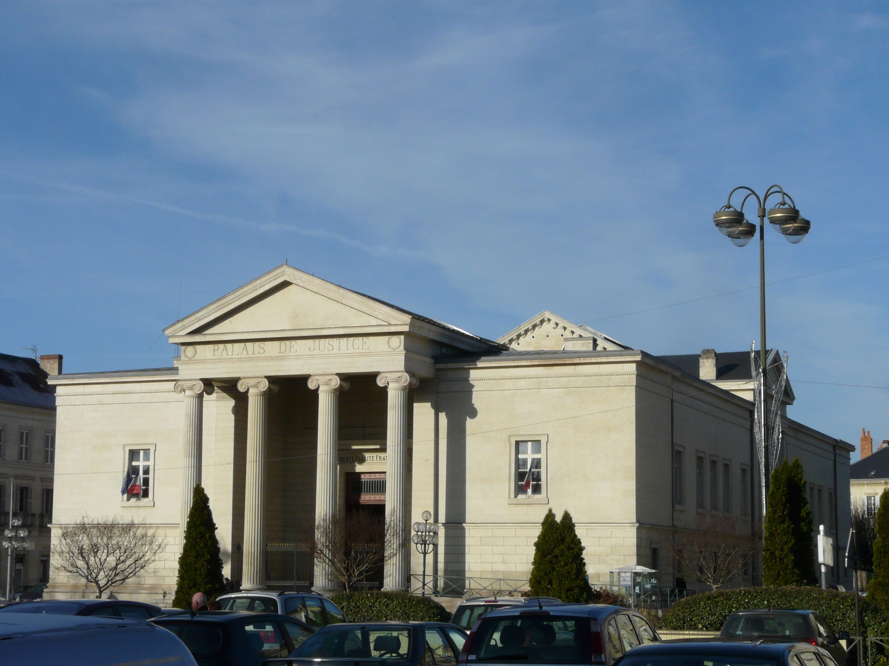 Au sud-est, la façade principale du palais de Justice, Périgueux, Dordogne, France.